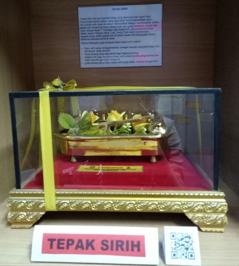 Tepak Sirih